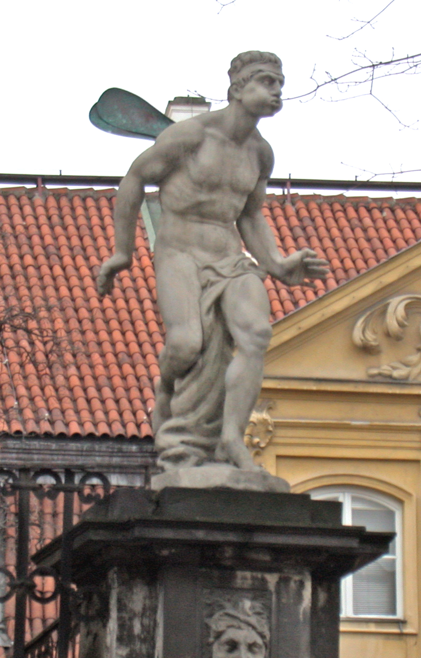 Varsavia, Palazzo dei Quattro Venti (Pałac Pod Czterema Wiatrami) su via Długa, statua di un vento ("Noto").